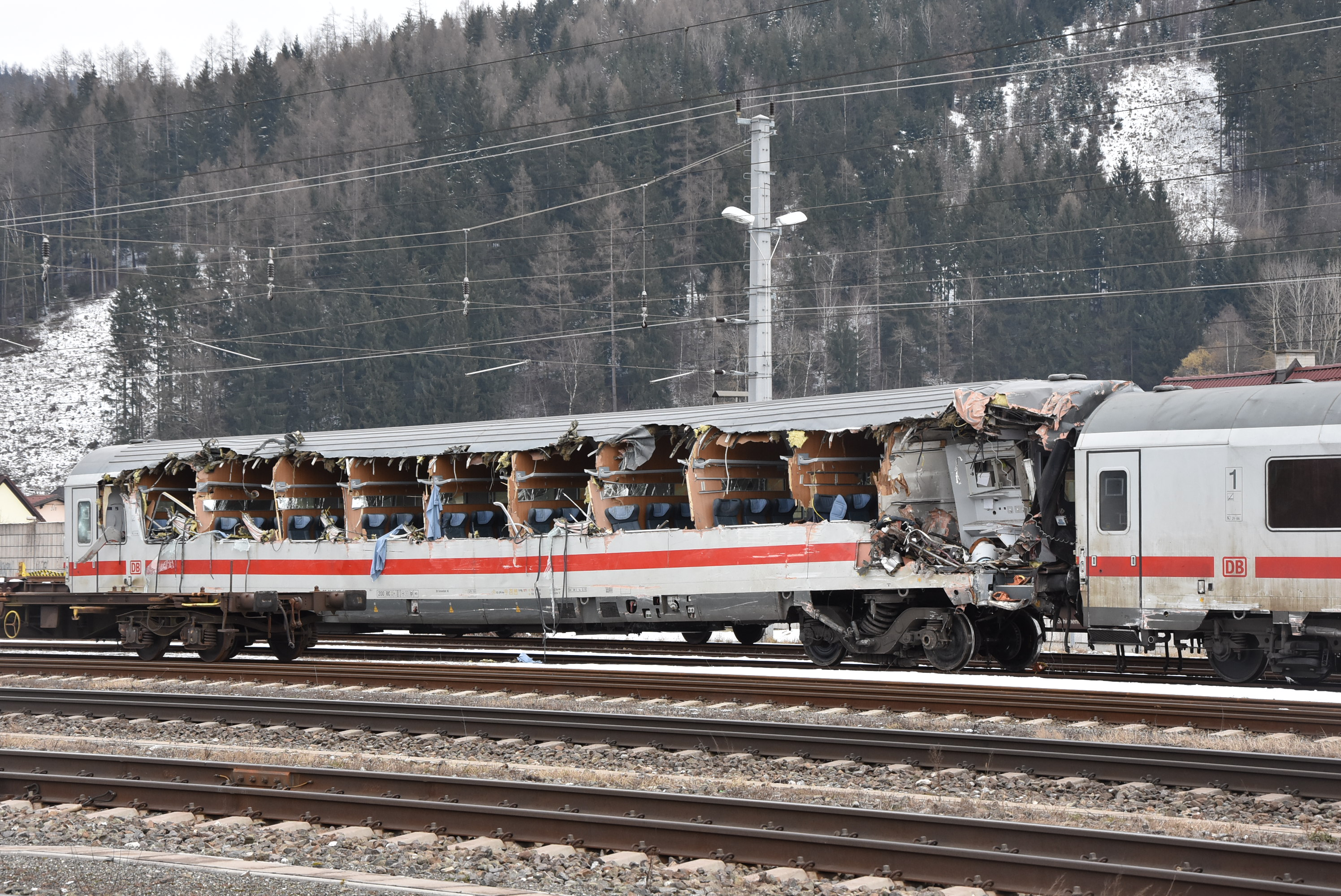 Waggons der beiden verunfallten Züge zwei Tage nach der Kollision im Bahnhofsbereich von Niklasdorf.